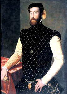 Supuesto retrato de Garcilaso de la Vega. Galería de Kassel.